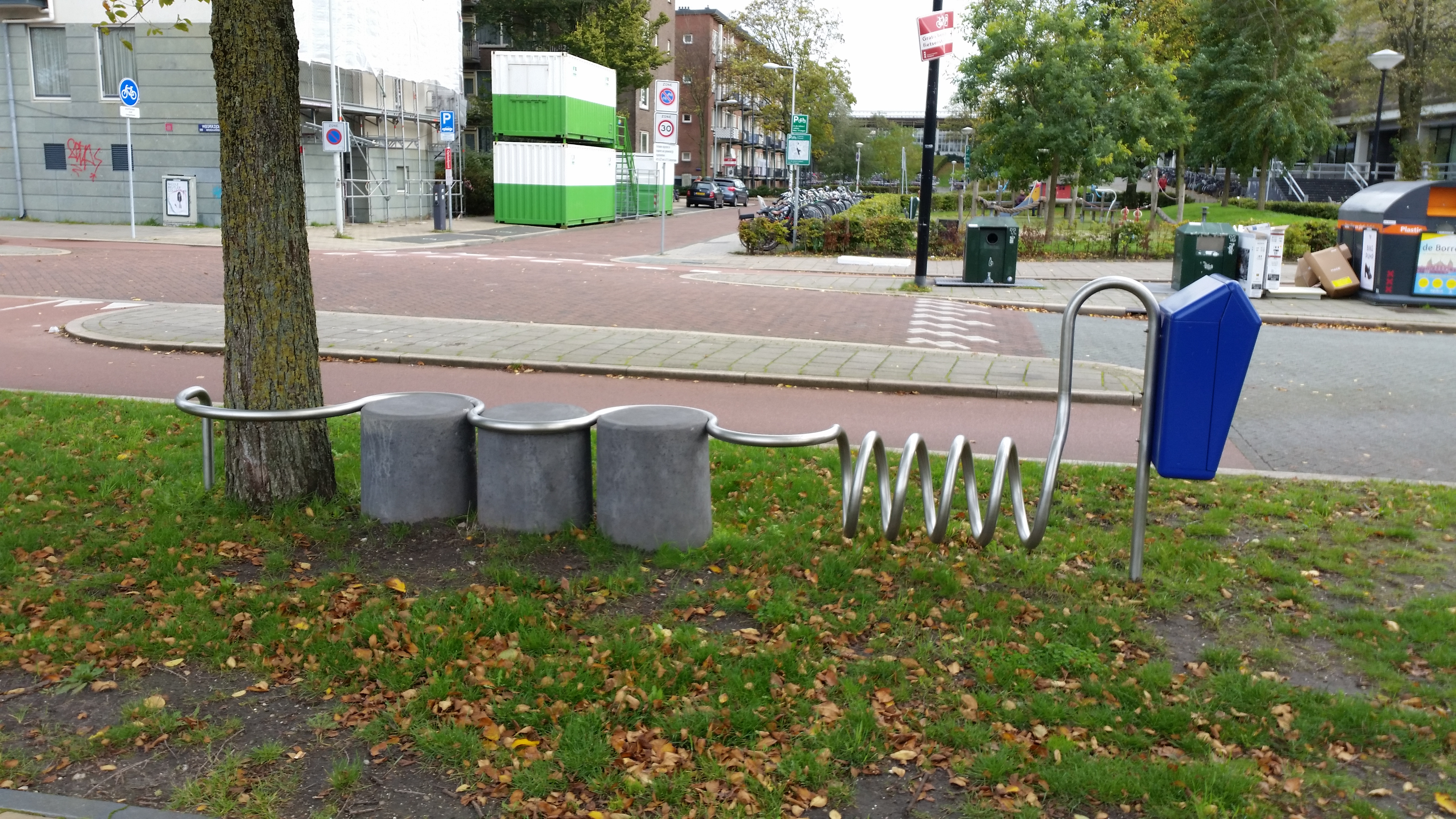 Bank-Afvalbak Weesperzijde